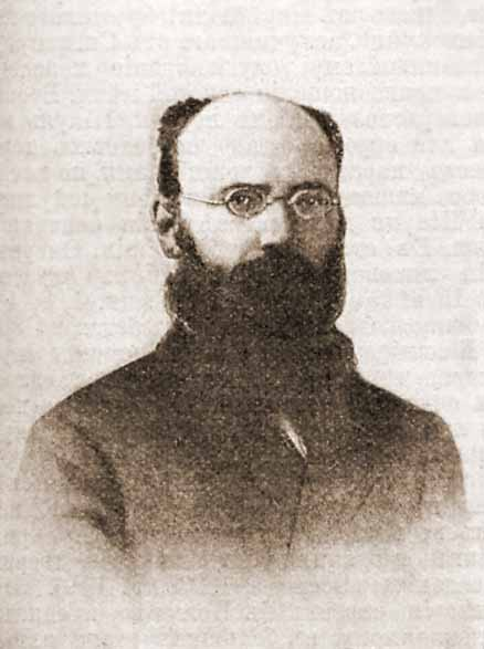 БЕРШАДСКИЙ Сергей Александрович